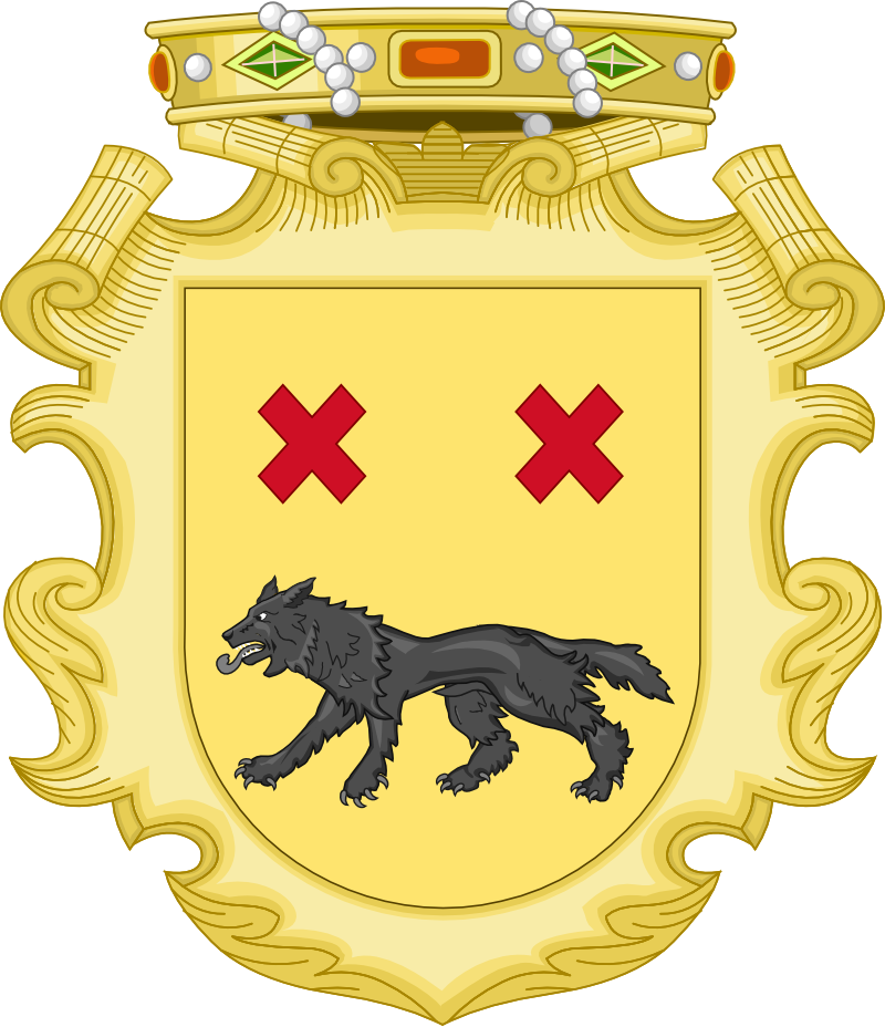 Escudo de Sorreguieta.